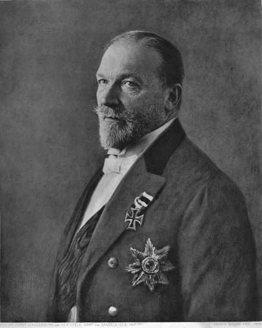 Philipp Fürst zu Eulenburg und Hertefeld, Graf von Sandels, 1906(fec. Erwin Raupp)